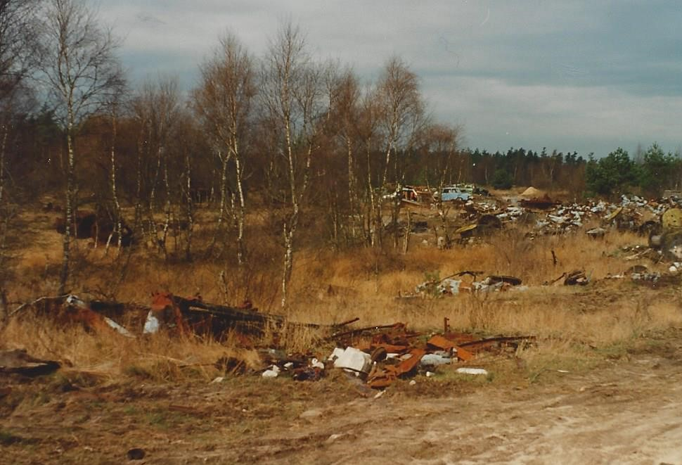 Schrott der Russischen Luftwaffe auf dem Schießplatz Retzower Heide